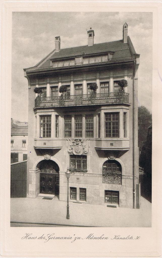 Das Corpshaus der Germania München im Jahre 1908